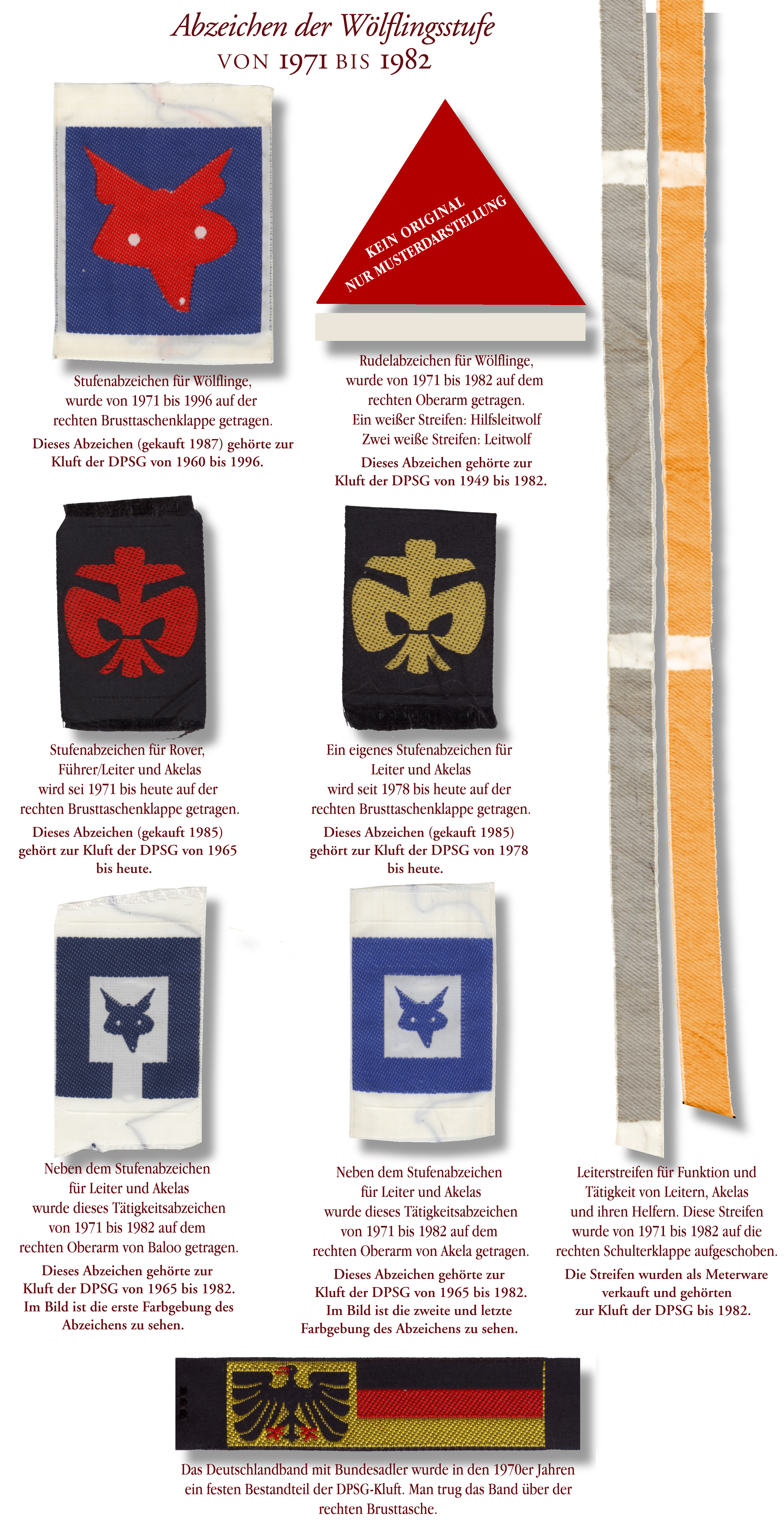 Abzeichen der DPSG-Wölflingsstufe wie sie zwischen 1971 und 1982 getragen wurden.